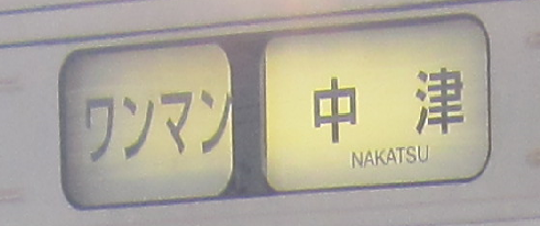 ワンマン中津 行先表示